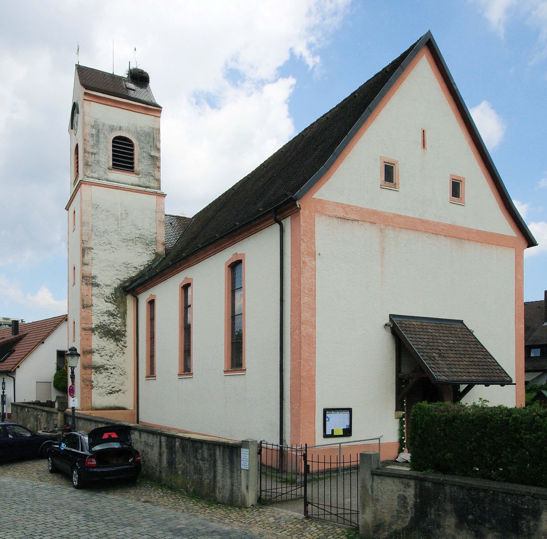 Pfarrkirche St. Thomas in Betzenhausen ein Stadtteil Freiburgs Blick auf die Kirche und den Haupteingang von Süden